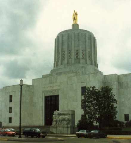 Oregon State Capitol